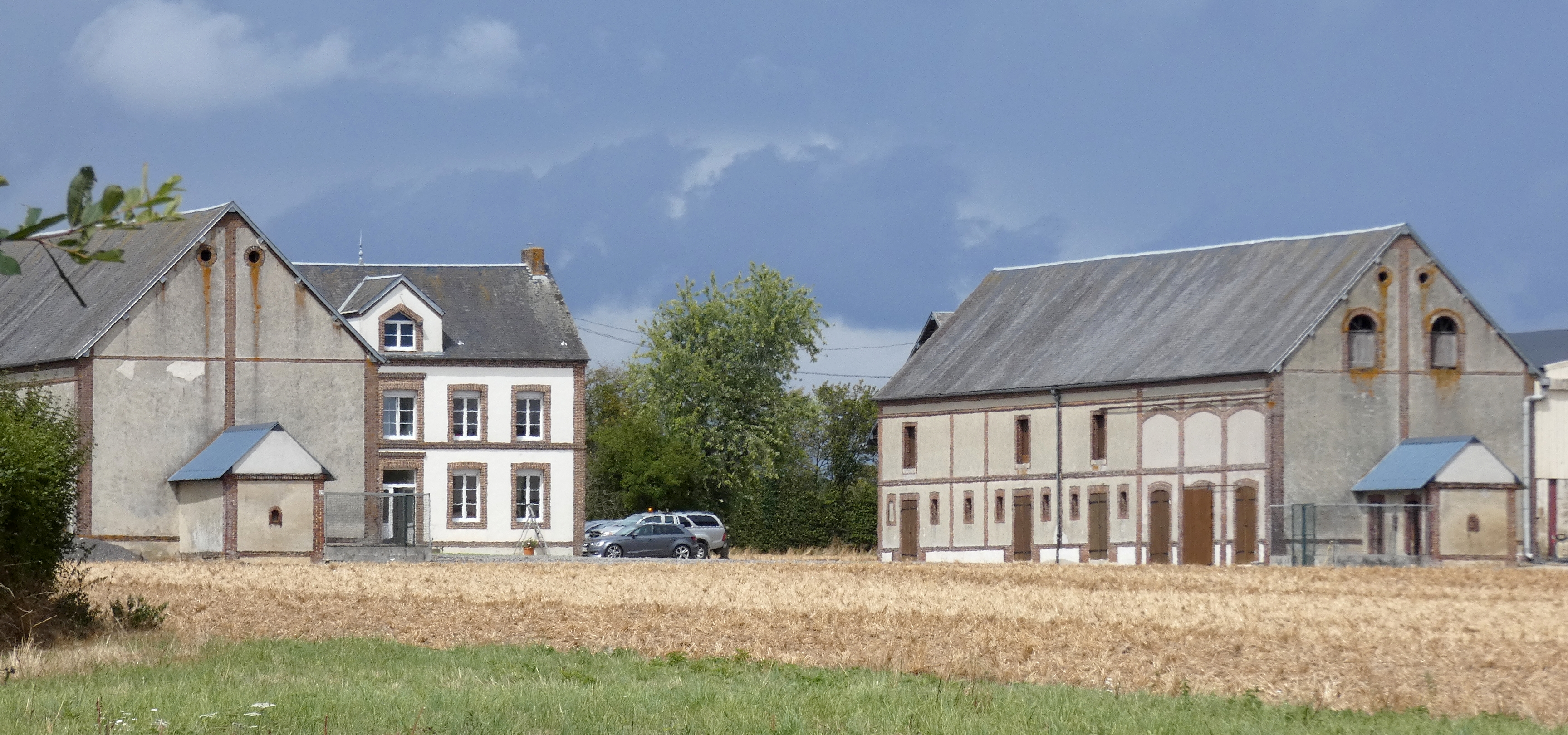 Crulai (Normandie, France). La ferme de la Cornillière